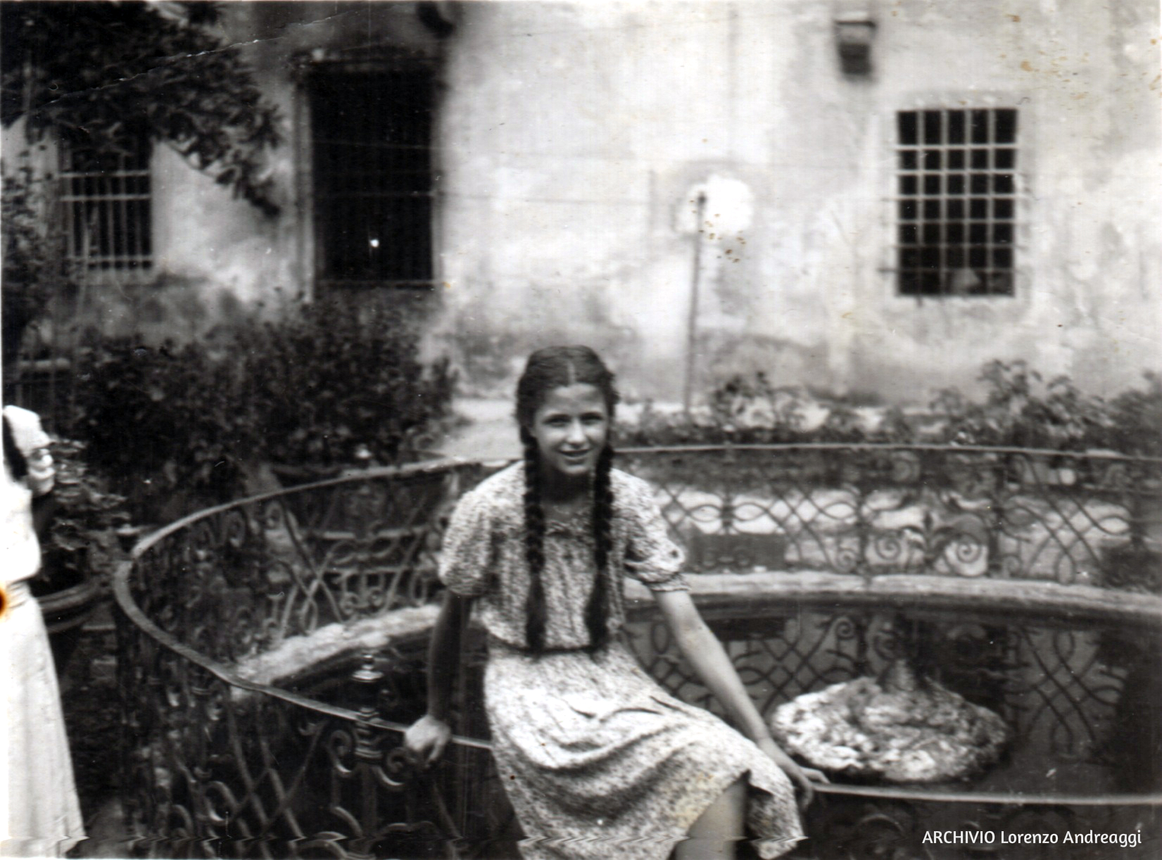 Fontana della Villa del Bandino